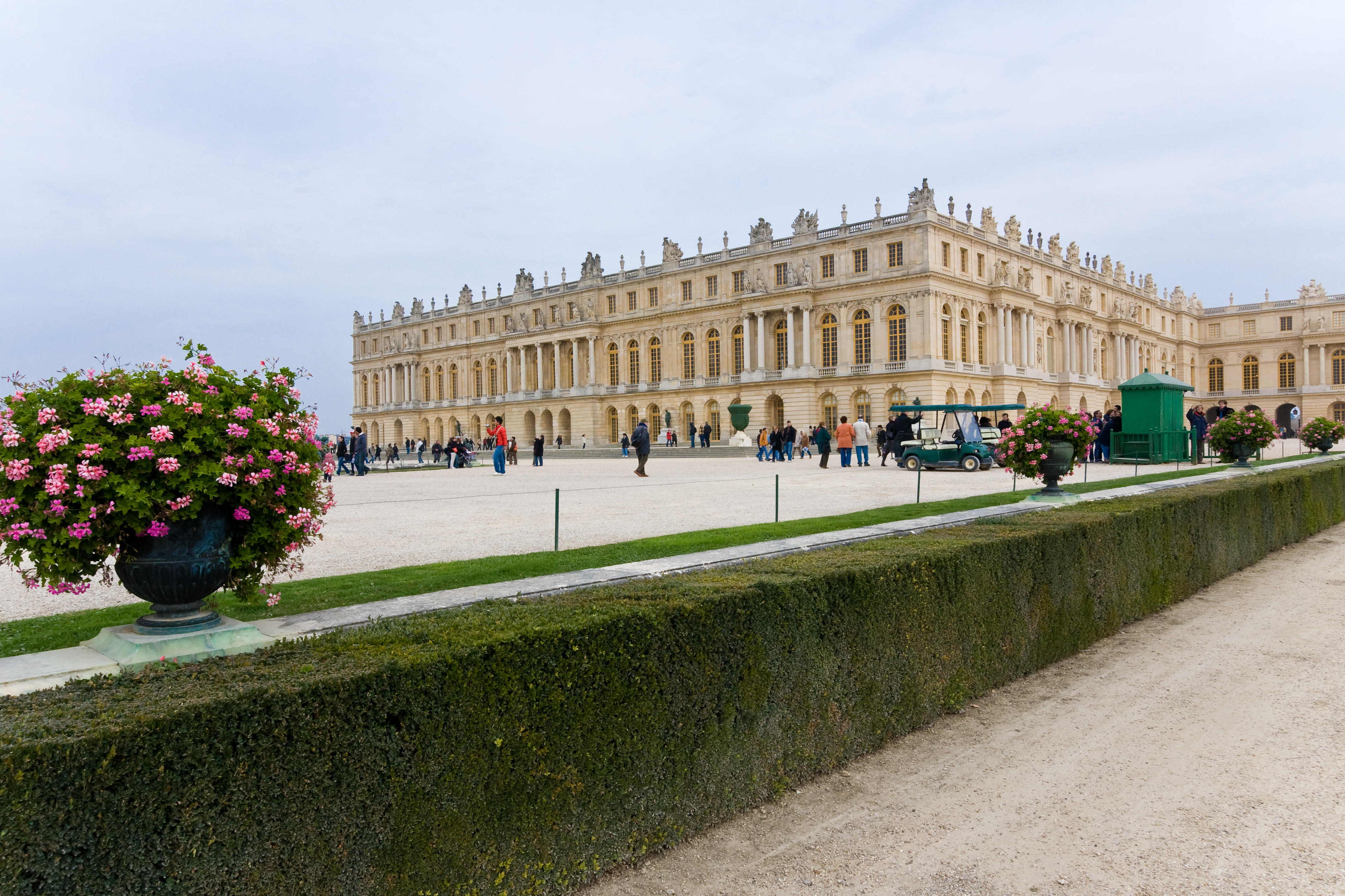 Château de Versailles, vu des jardins